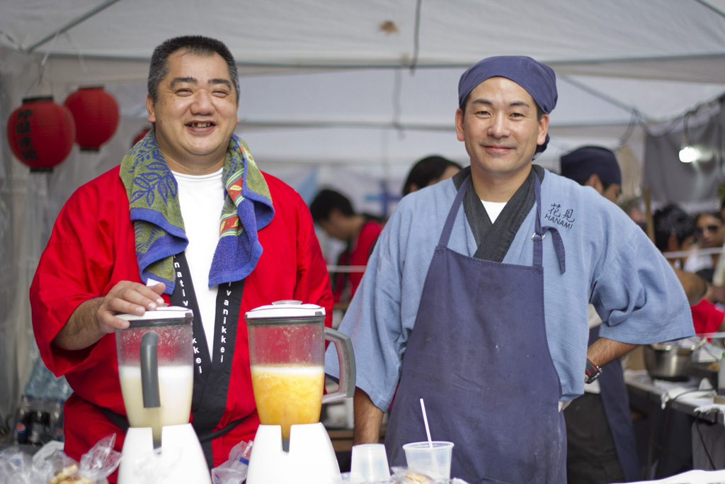 Organizado por la Dirección General de Colectividades de la Subsecretaría de Derechos Humanos y Pluralismo Cultural del gobierno porteño, el sábado 10 de marzo tuvo lugar el el primer Patio Gastronómico de las colectividades. ( Foto: Estrella Herrera)